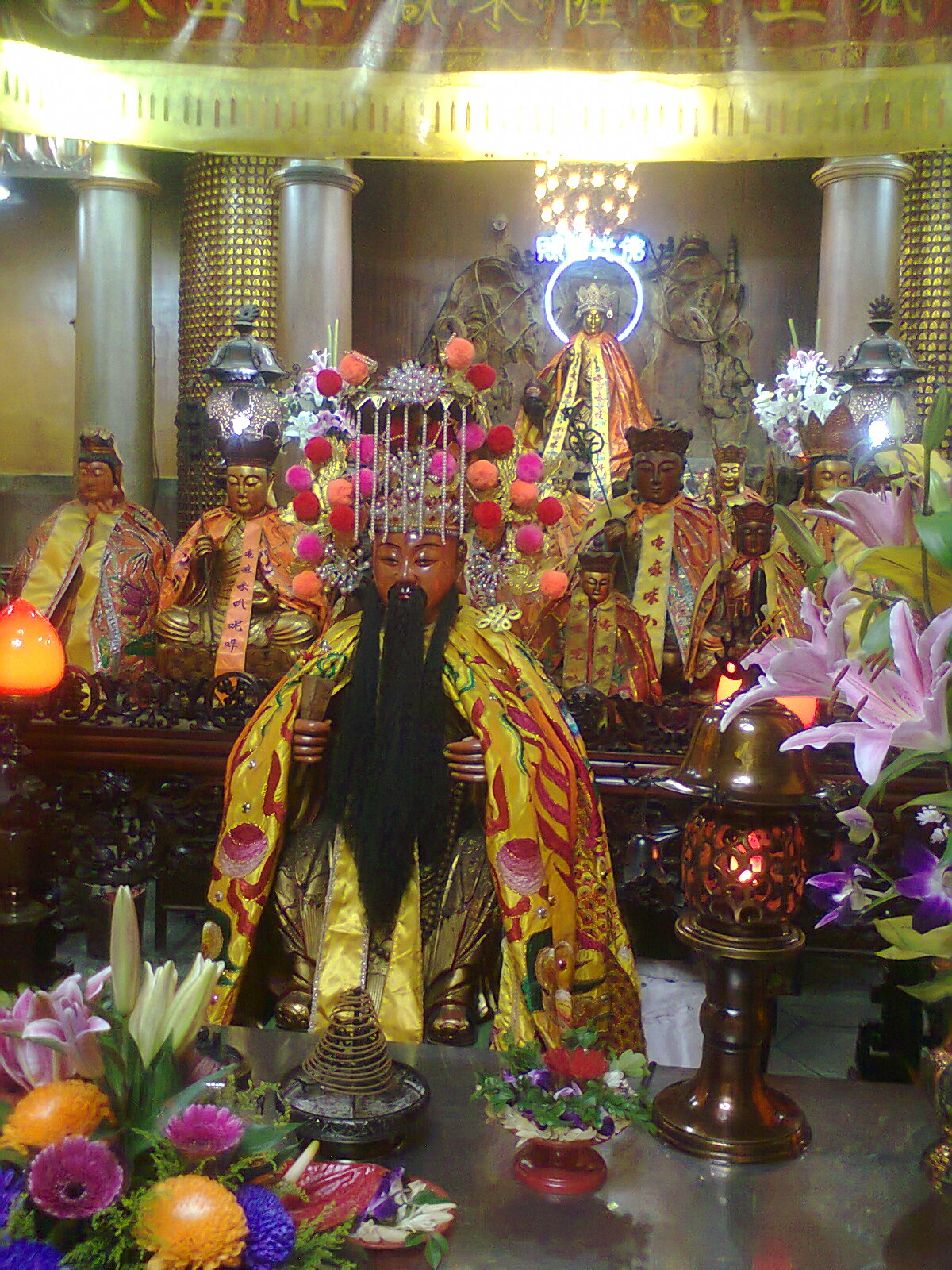 東寧宮的地藏王菩薩與東嶽大帝